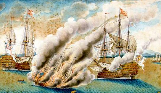 Combate entre navío Real Felipe y el Namur cuando se le lanzó el brulote Anne Galley para ser incendiado al Real Felipe. La nave insignia española lo destruyó con un certero cañonazo. (Museo Naval de Madrid).